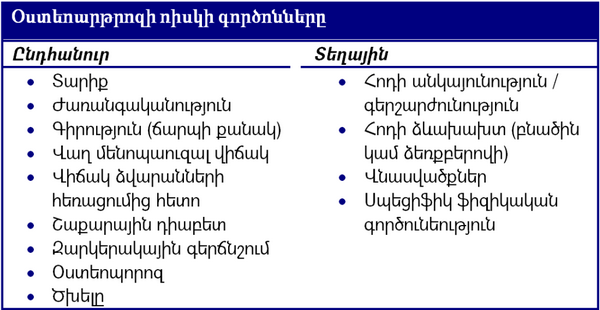 Օստեոարթրոզի ռիսկի գործոնները